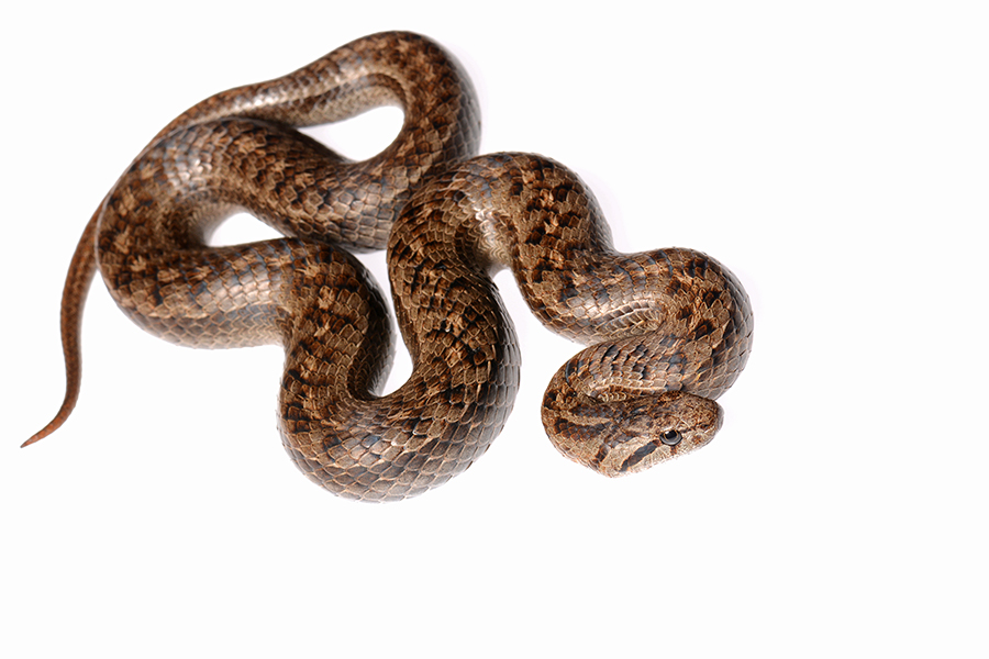 Colubridae: Tachymenis peruviana